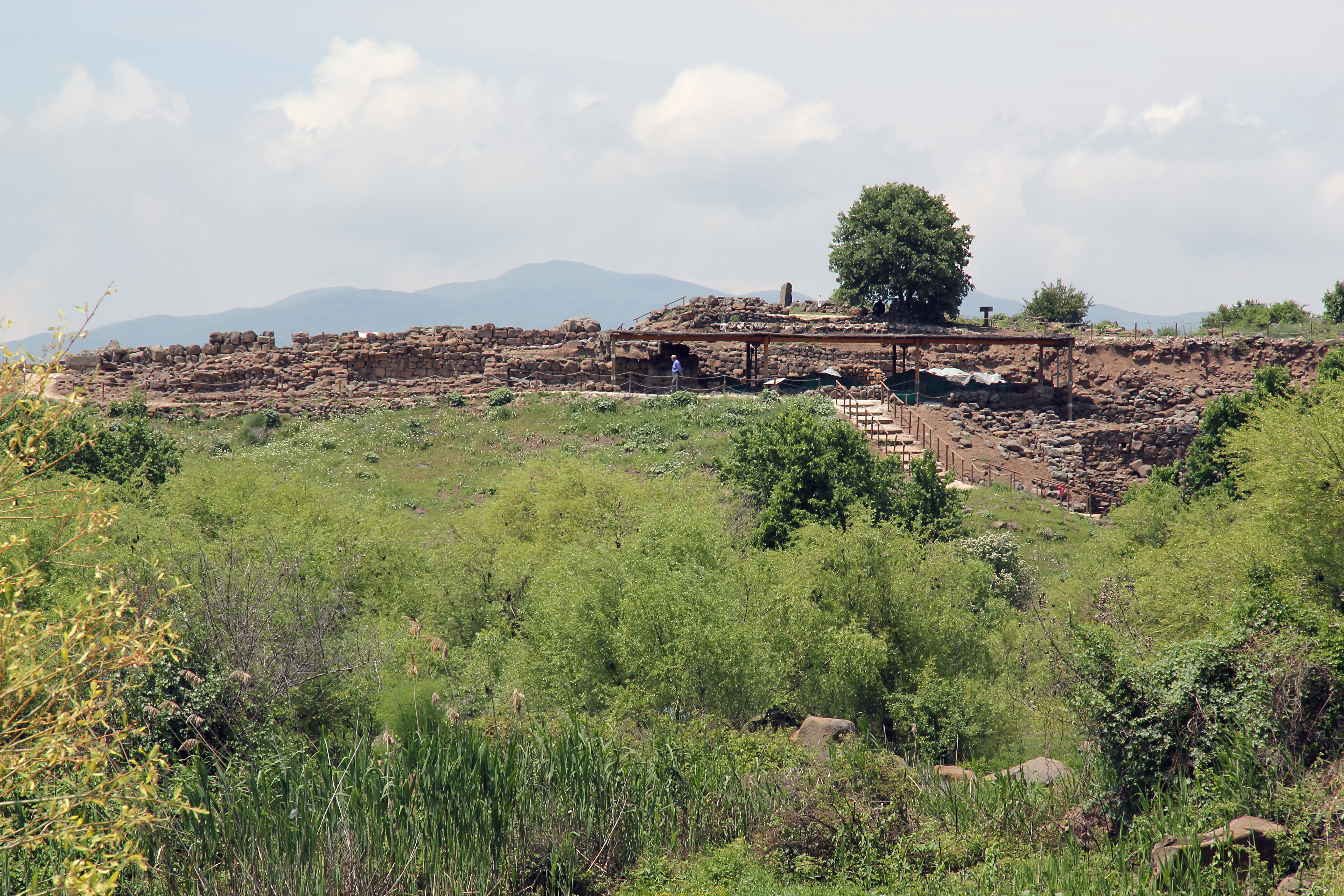 Tilmen Höyük, archäologischer Fundplatz in der Südosttürkei